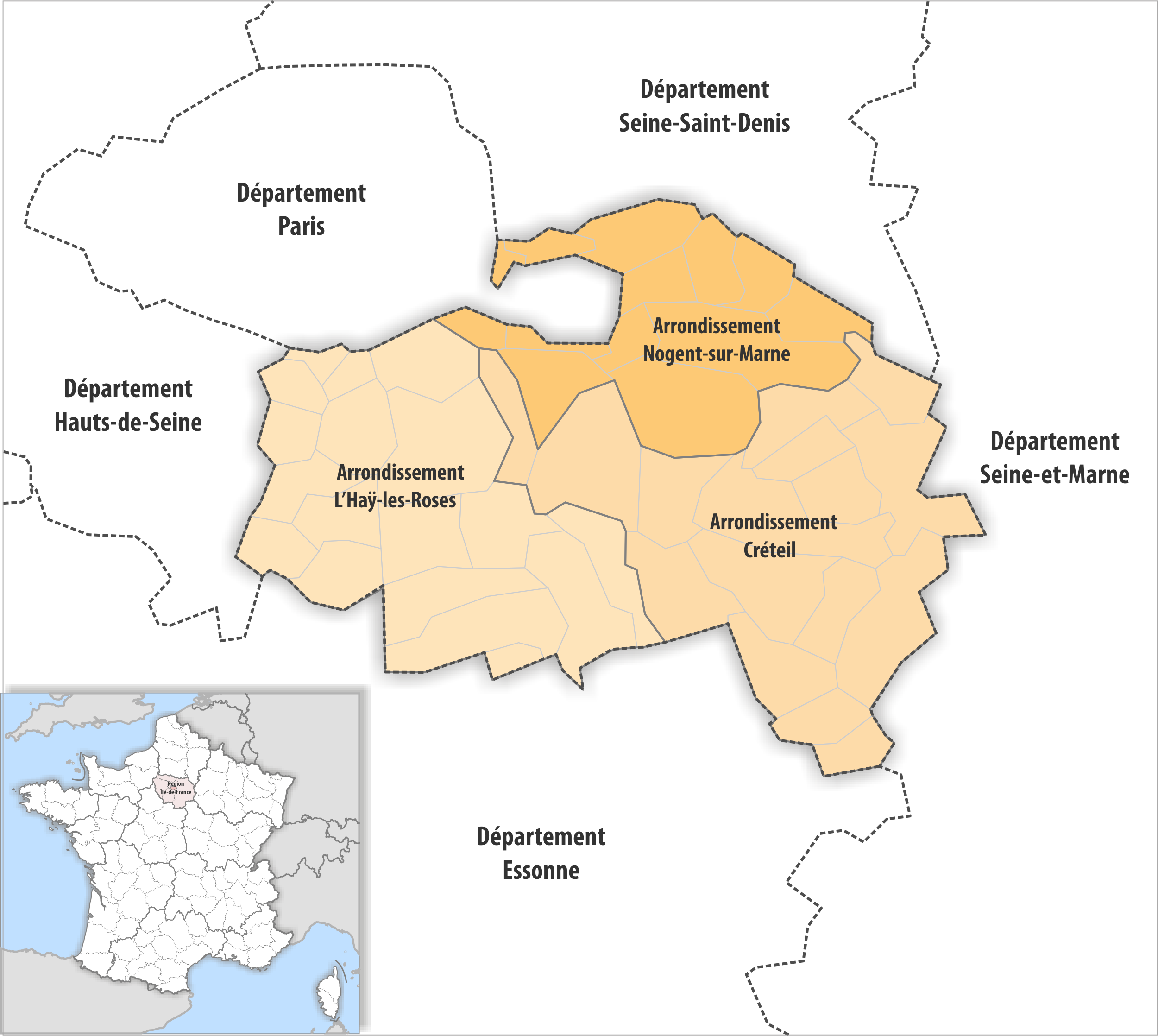 Gemeinden und Arrondissemente im Departement Val-de-Marne